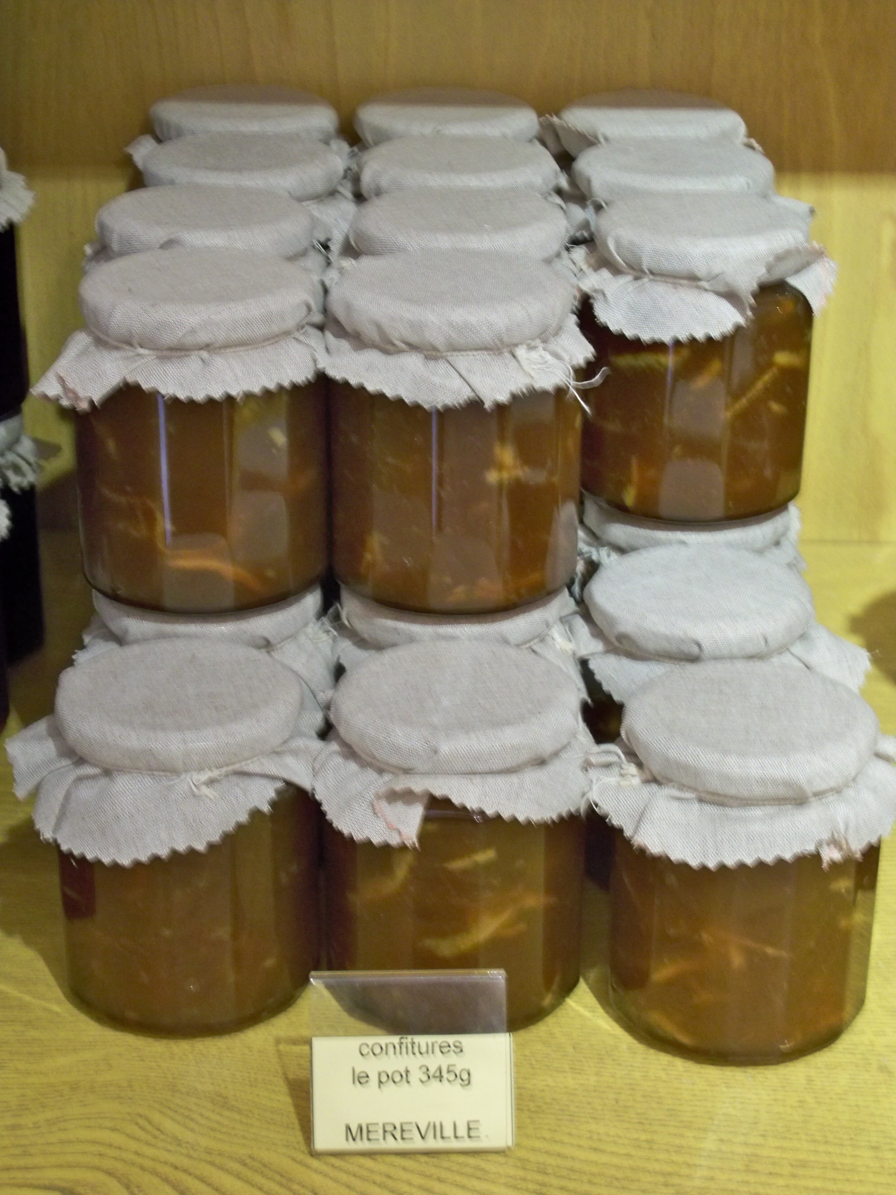 Confiture Mereville du Vaucluse